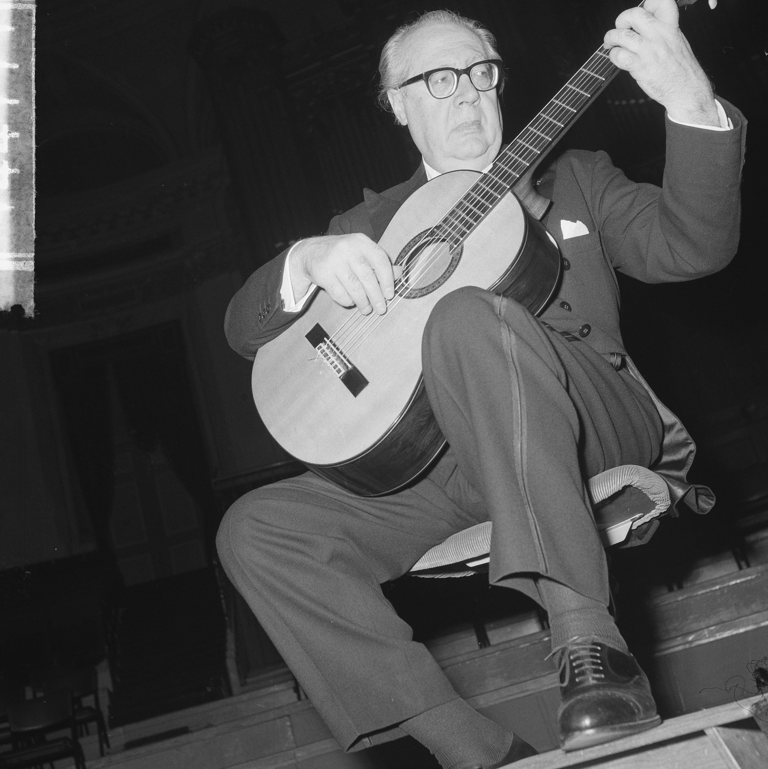 Collectie / Archief : Fotocollectie Anefo Reportage / Serie : [ onbekend ] Beschrijving : Andres Segovia in het Concertgebouw Datum : 3 november 1962 Trefwoorden : CONCERTGEBOUWEN Fotograaf : Nijs, Jac. de / Anefo Auteursrechthebbende : Nationaal Archief Materiaalsoort : Negatief (zwart/wit) Nummer archiefinventaris : bekijk toegang 2.24.01.03 Bestanddeelnummer : 914-4771